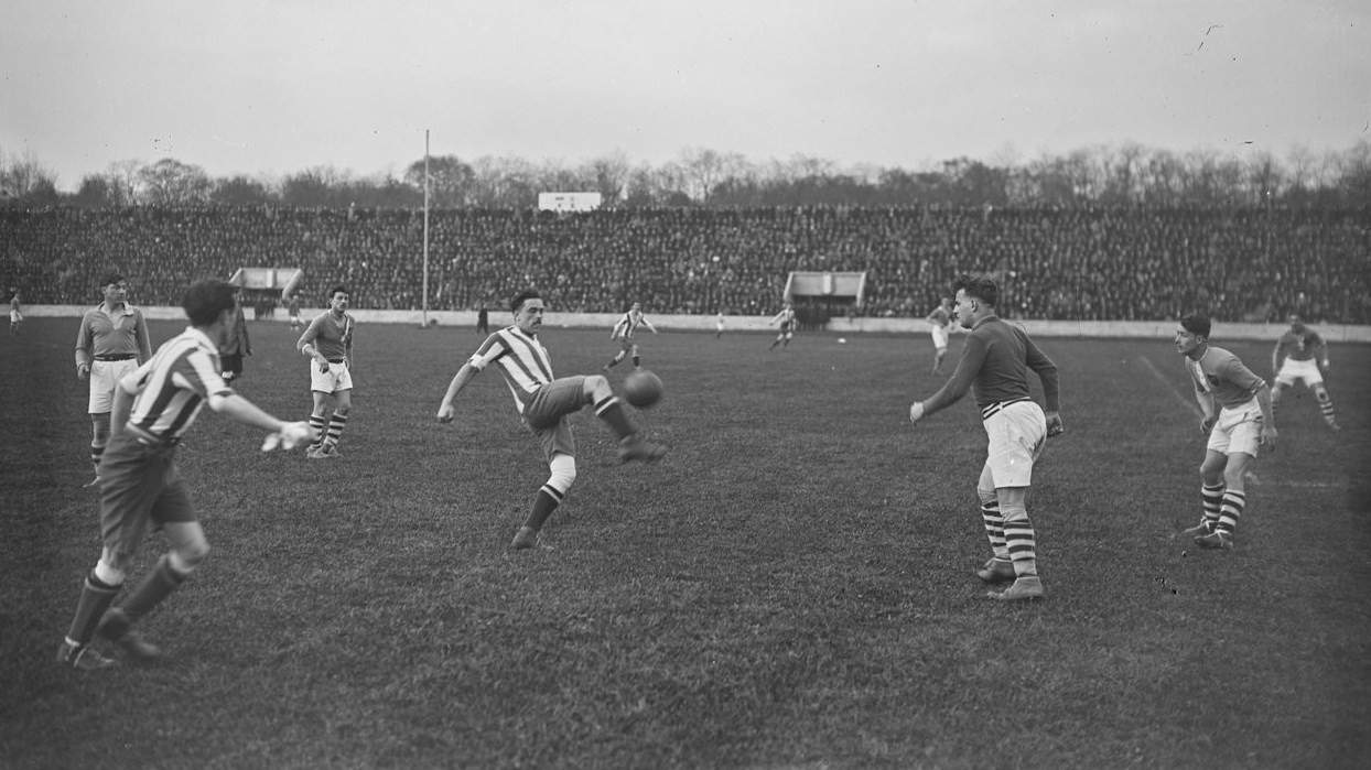 Demi-finale de la Coupe de France de football 1923 entre le Red Star Athletic Club et l'Olympique de Paris le 8 avril 1923 au stade Pershing de Paris (1-0 pour le Red Star). Paul Nicolas dégage la balle.